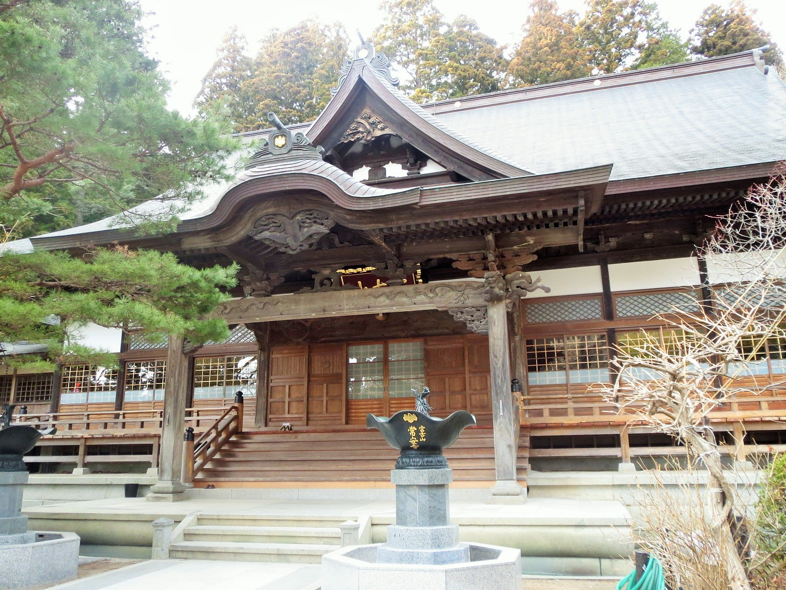 宮古市にある常安寺 Canon IXY 3